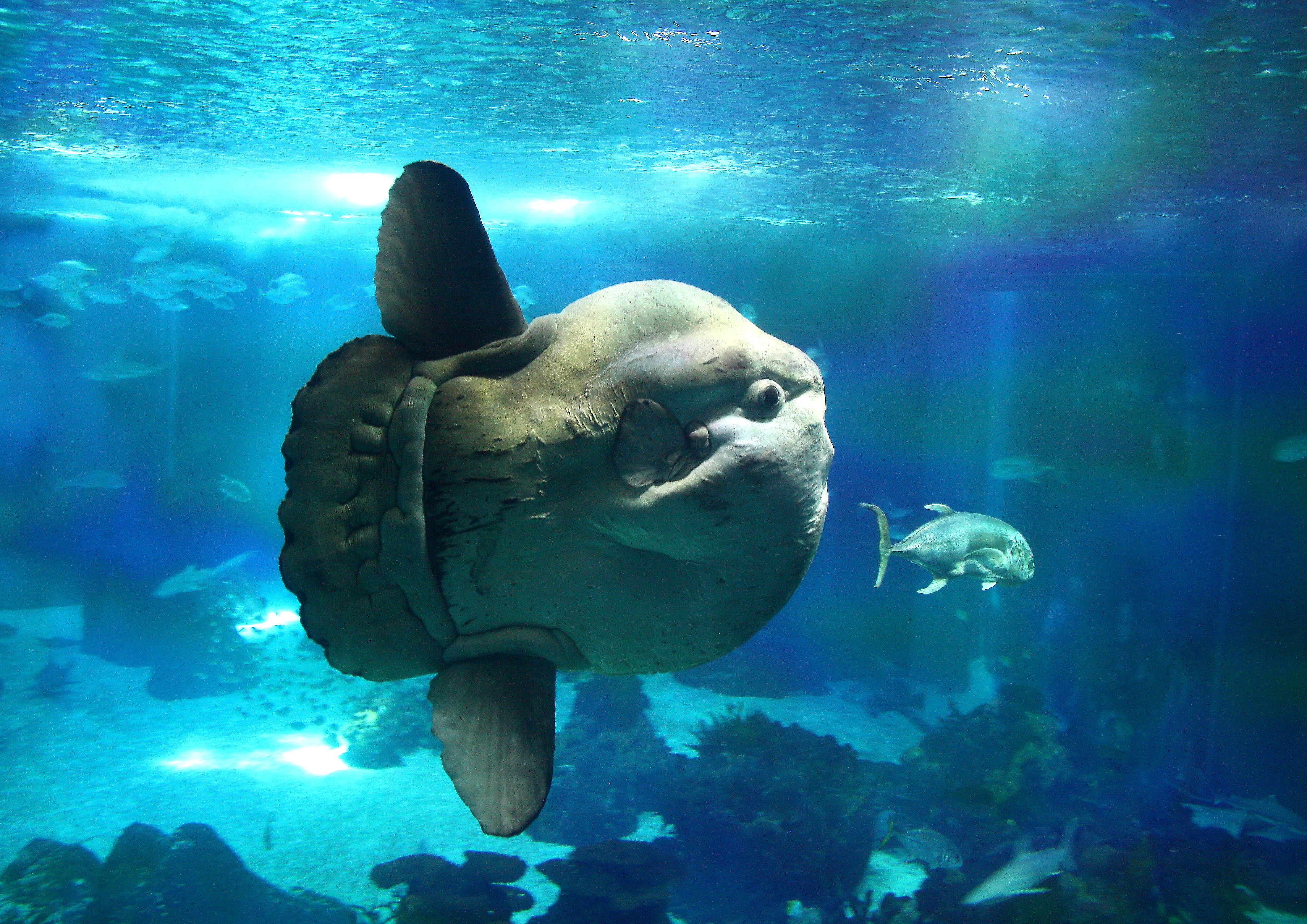 Oceanarium at Parque das Nações